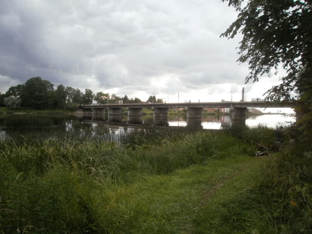 Vaade läänebastioni eest sadama suunas. Esiplaanil Via Baltica maanteesild.